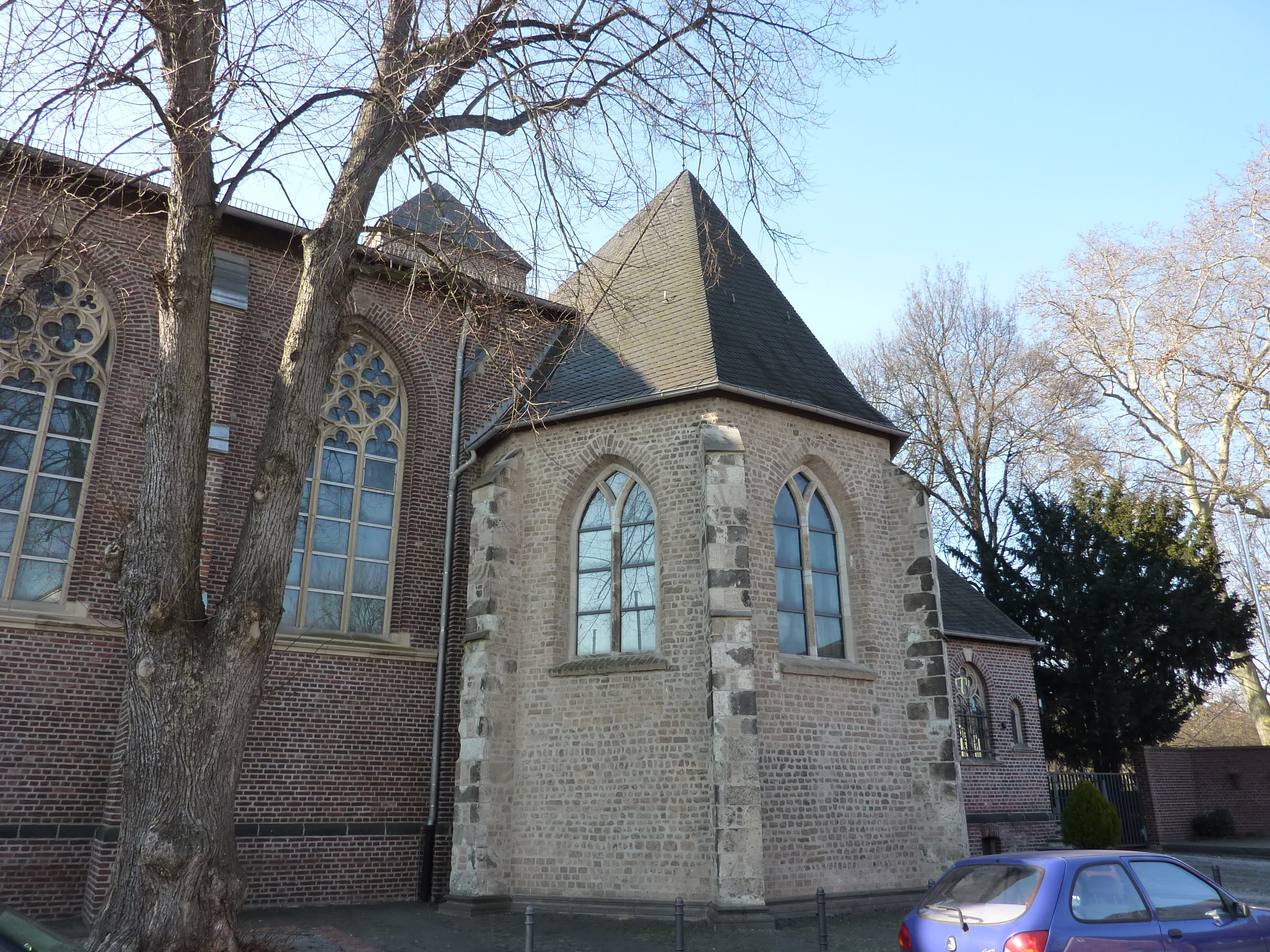 St. Mariä Geburt (Köln-Stammheim)